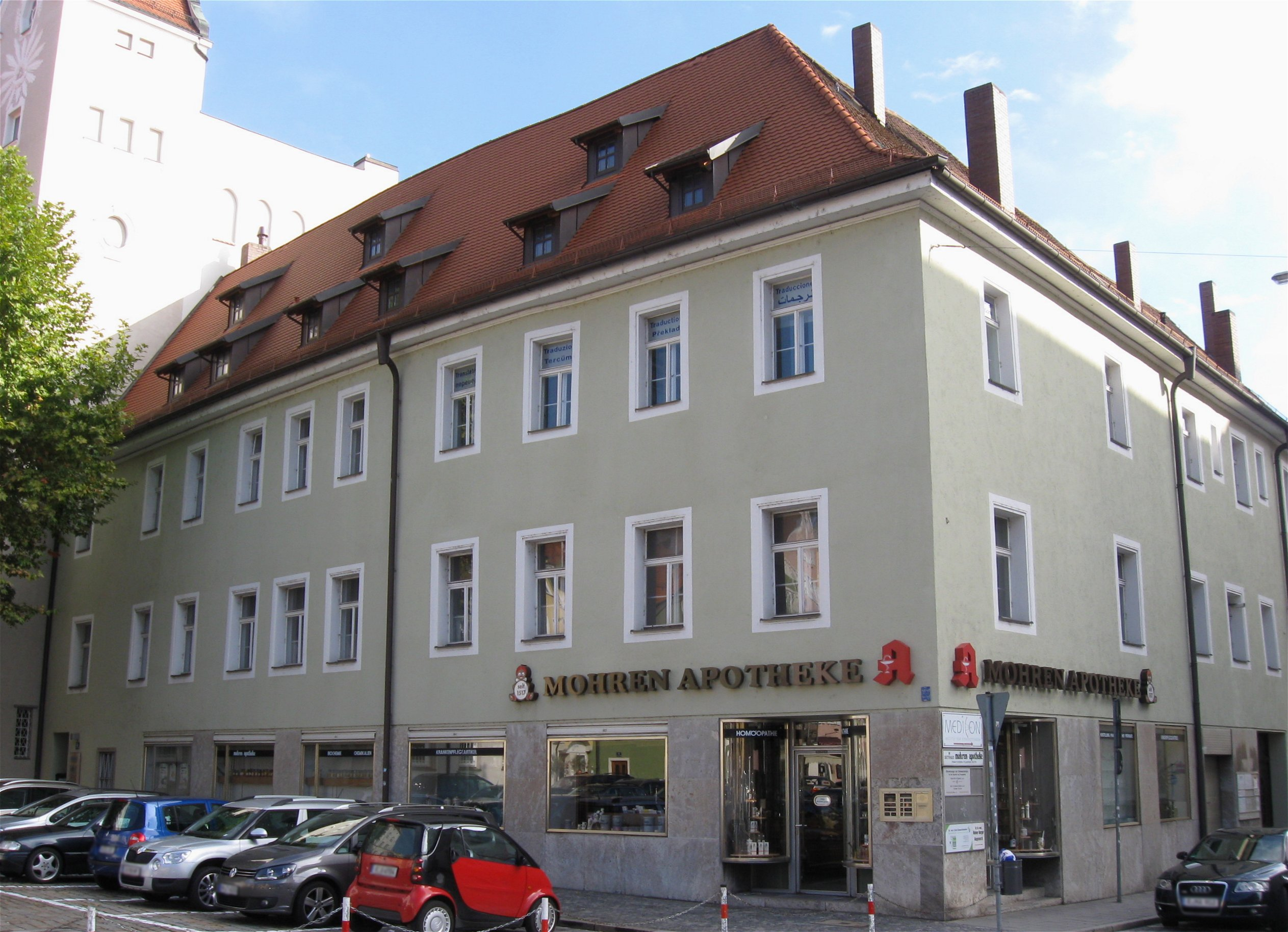 Alter Kornmarkt 5a; Dreiflügelanlage, dreigeschossig, mit Walmdach, aus drei Bauten im Barock zusammengefasst; Alter Kornmarkt 5 und Pflugasse 1 mittelalterliches Erdgeschoss, darüber 16. Jh., über romanischen und frühgotischen Kellern, Apothekeneinbau 1873, Erdgeschossausbau 1926; Erhardigasse 10, urspr. Stadel, dreigeschossiger Bau mit Aufzugsgaube, im 19. Jh. zum Wohnhaus ausgebaut.